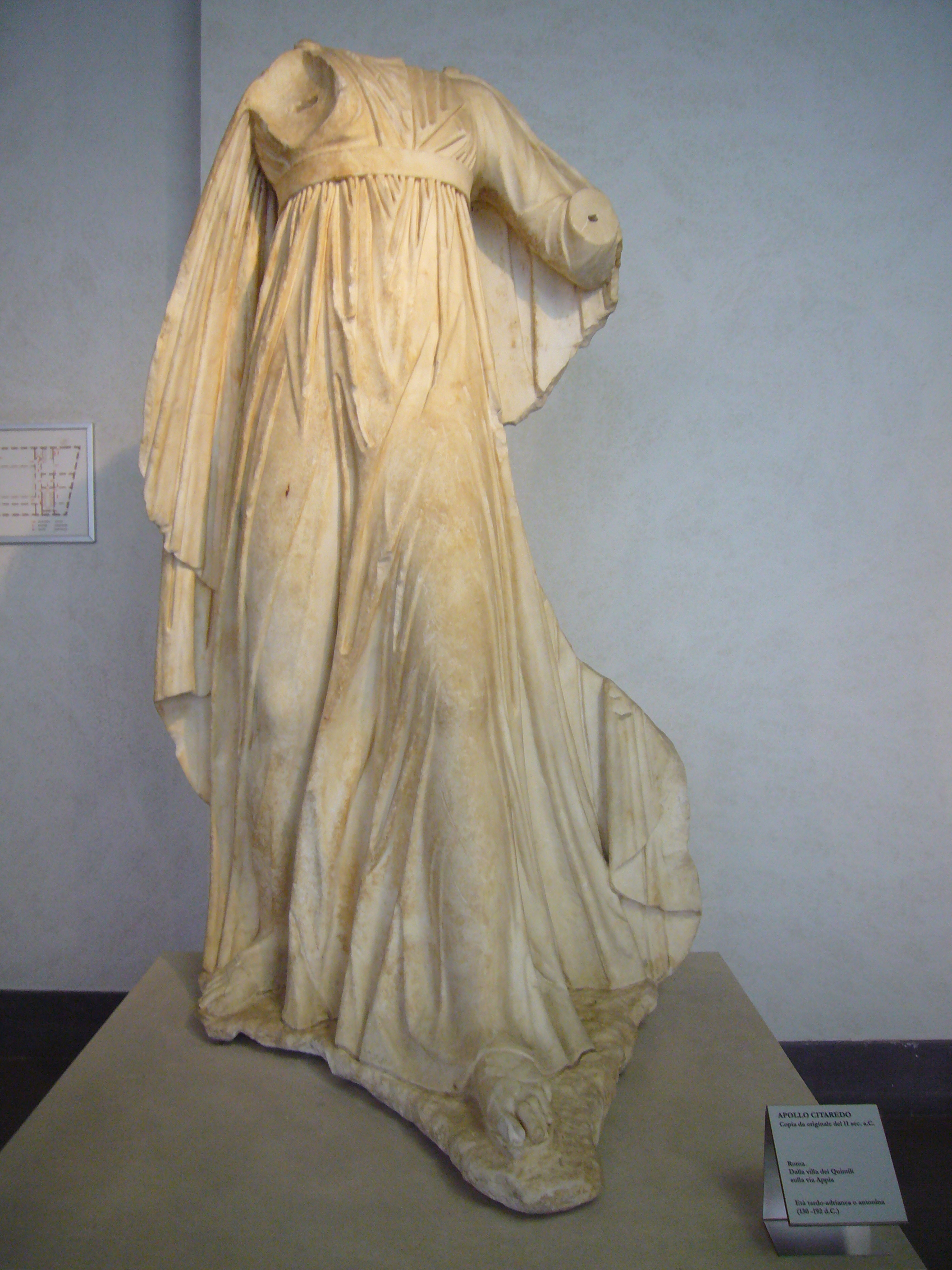 Roma, Museo Nazionale Romano a Palazzo Massimo: Apollo tipo Vaticano-Stoccolma dalla villa dei Quintili, rinvenuto nel 1925. Num.cat. 173